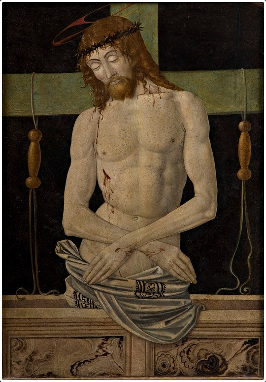 tavola, pittura a tempera